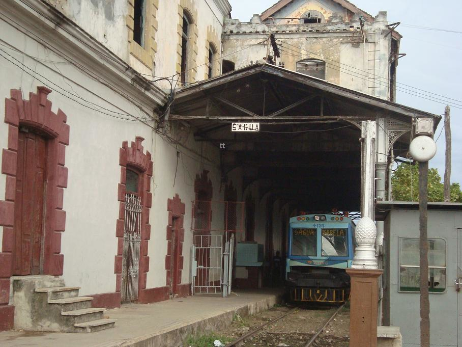 Estación Ferroviaria de Sagua-Boca del Andén a Isabela